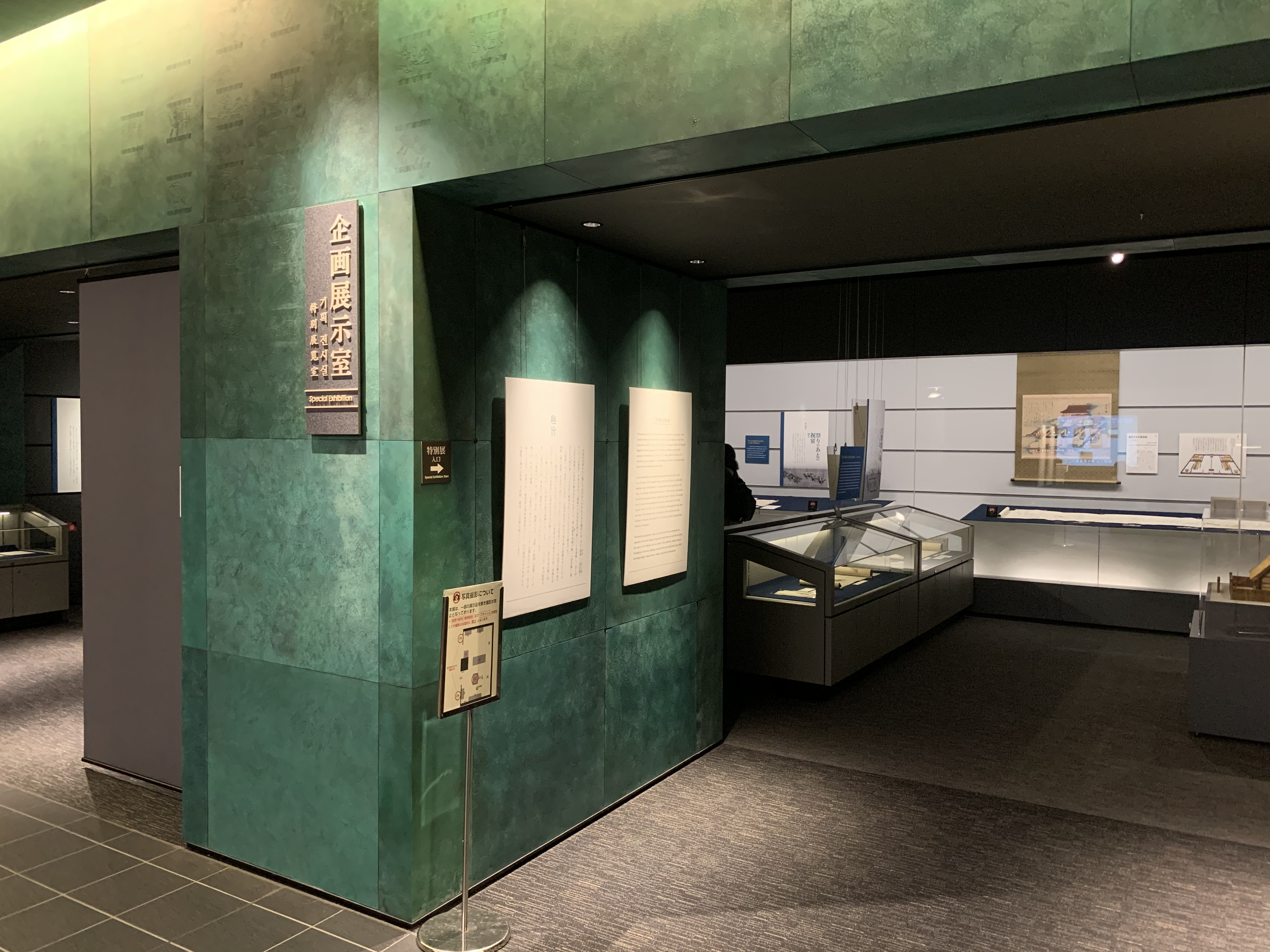 國學院大學博物館の企画展示室を室外から撮影した写真